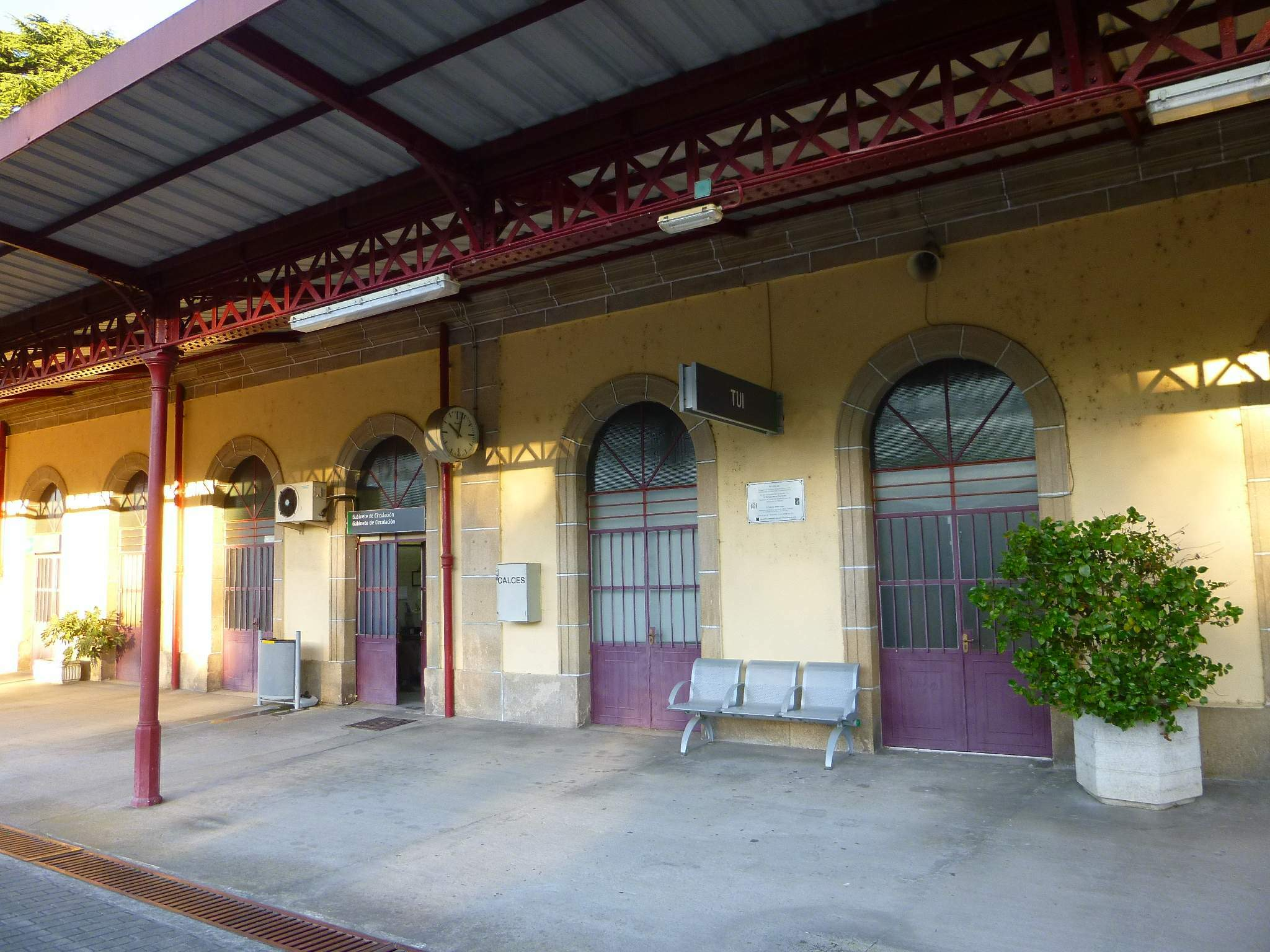 Tuy - Estación de tren